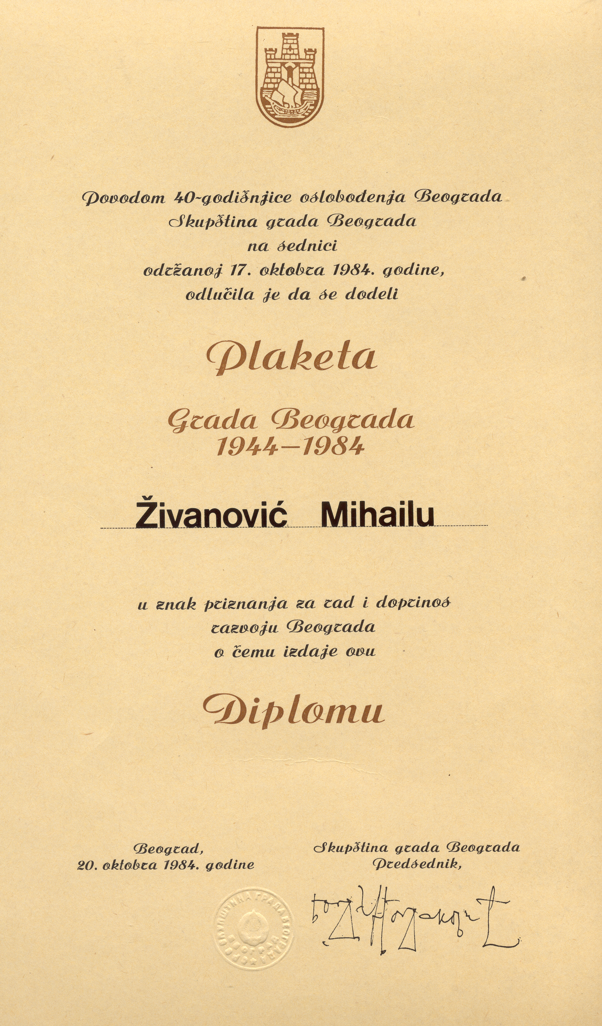 Srpskohrvatski / српскохрватски: Veliko priznanje Mihailu Živanoviću, Spomen-plaketa Beograd 1944-1984. povodom obeležavanja 40-godišnjice oslobođenja Beograda.